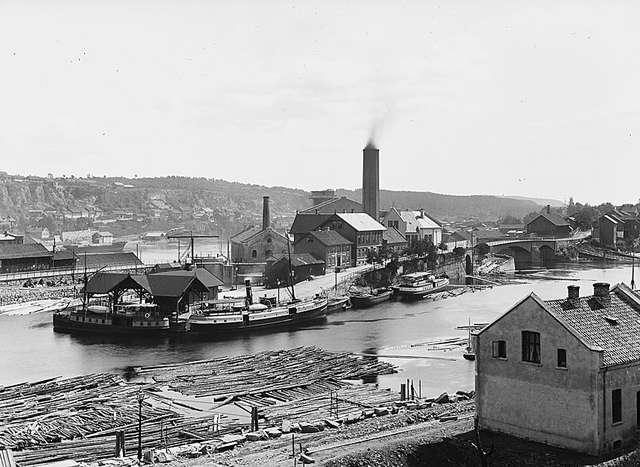 Parti af Byen